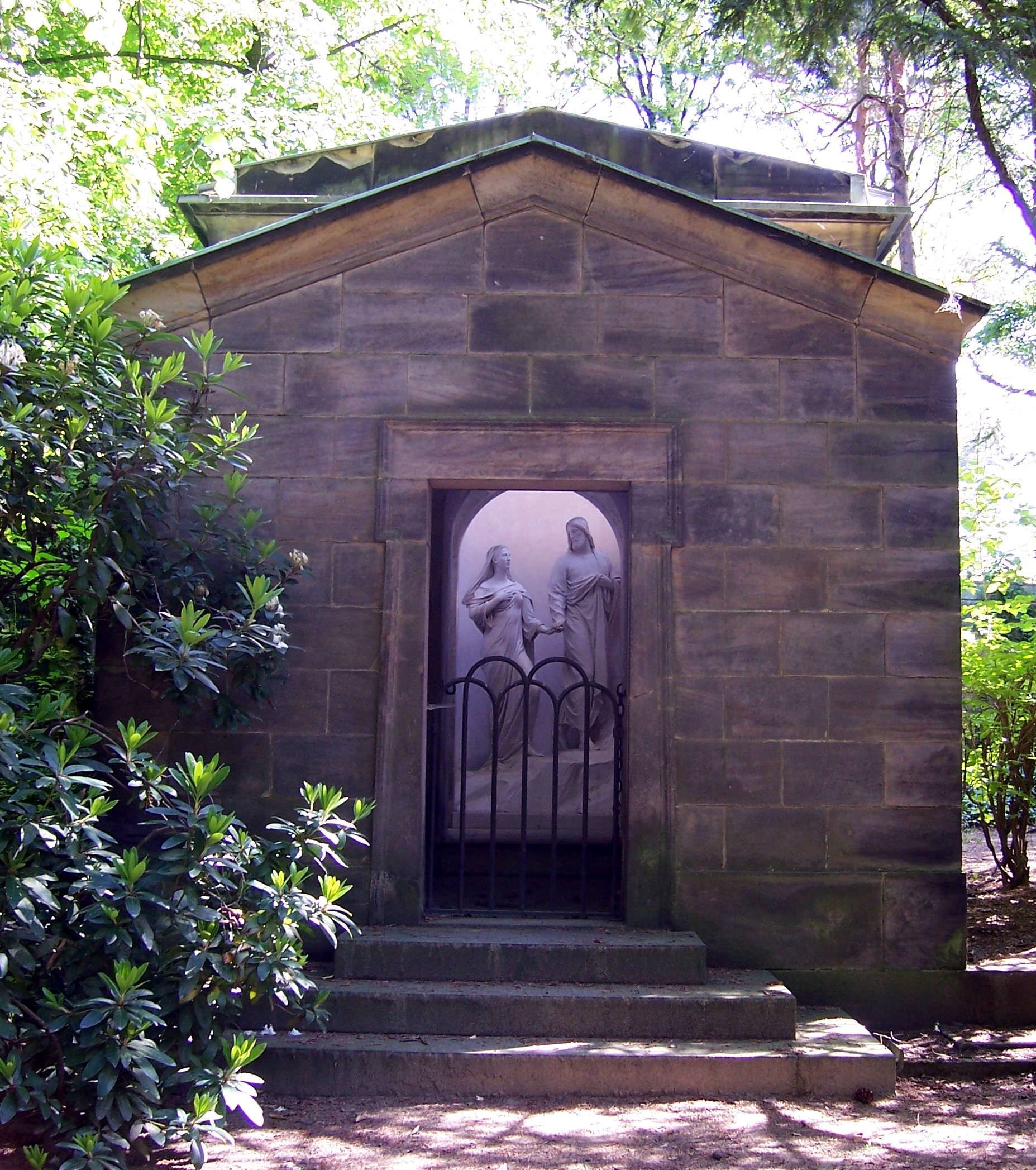 Mausoleum der Familie Müller mit einer Plastik von Johannes Schilling